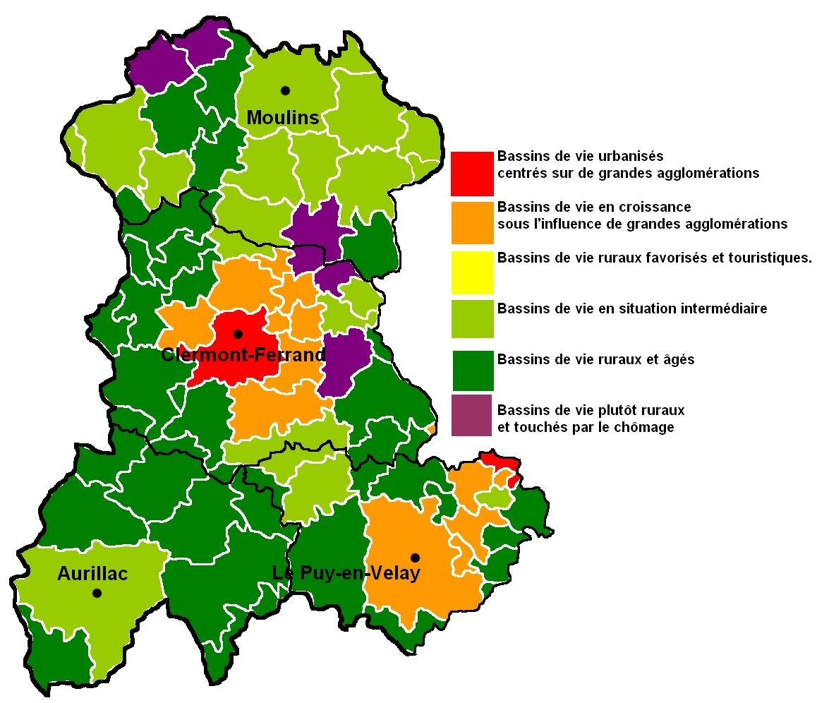 Typologie des bassins de vie dans l'acienne région Auvergne. Source INSEE recensement 2011, CAF, DGFIP.